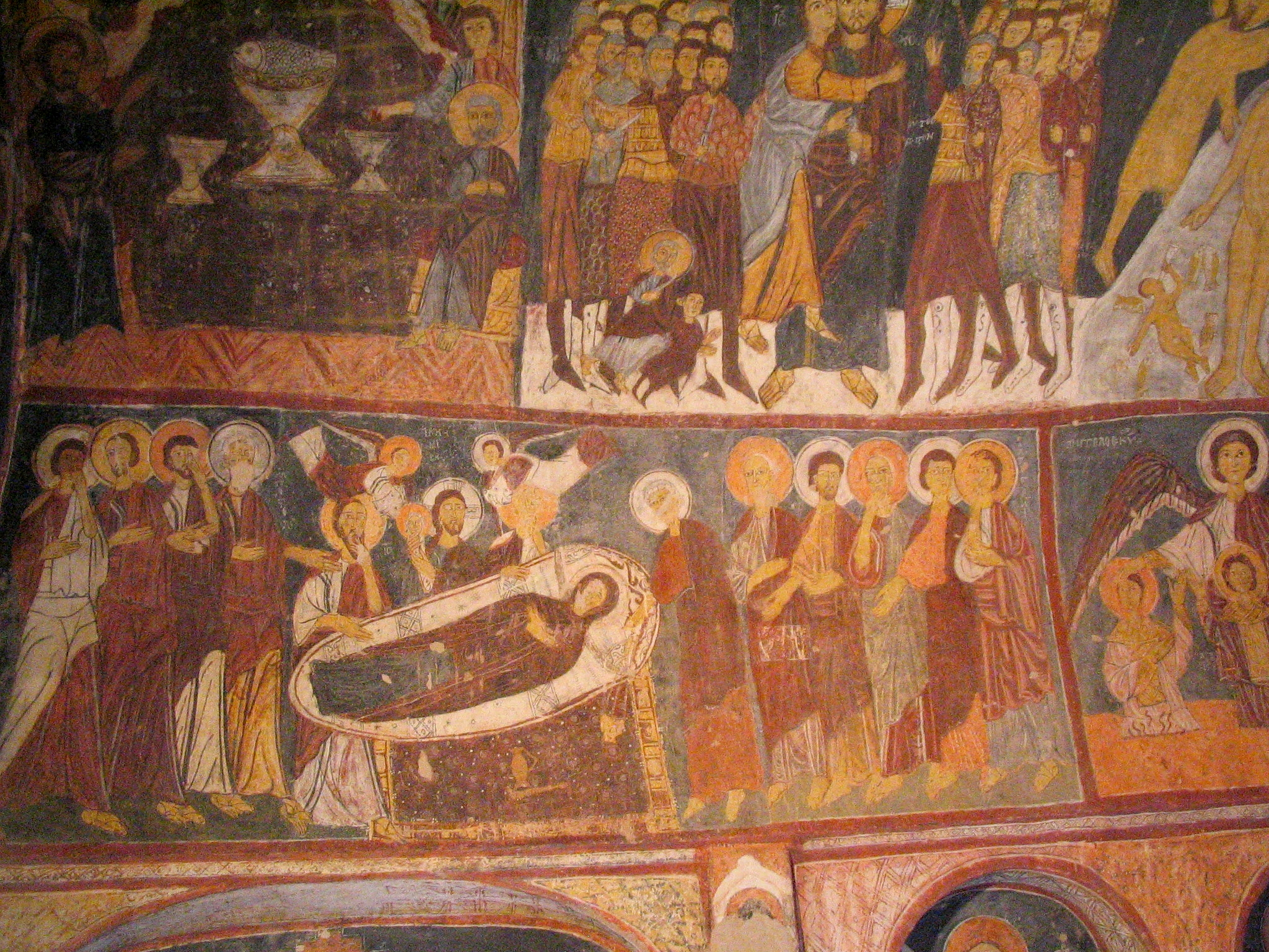 Fresken in der Johanneskirche in Gülşehir, Kappadokien, Zentraltürkei